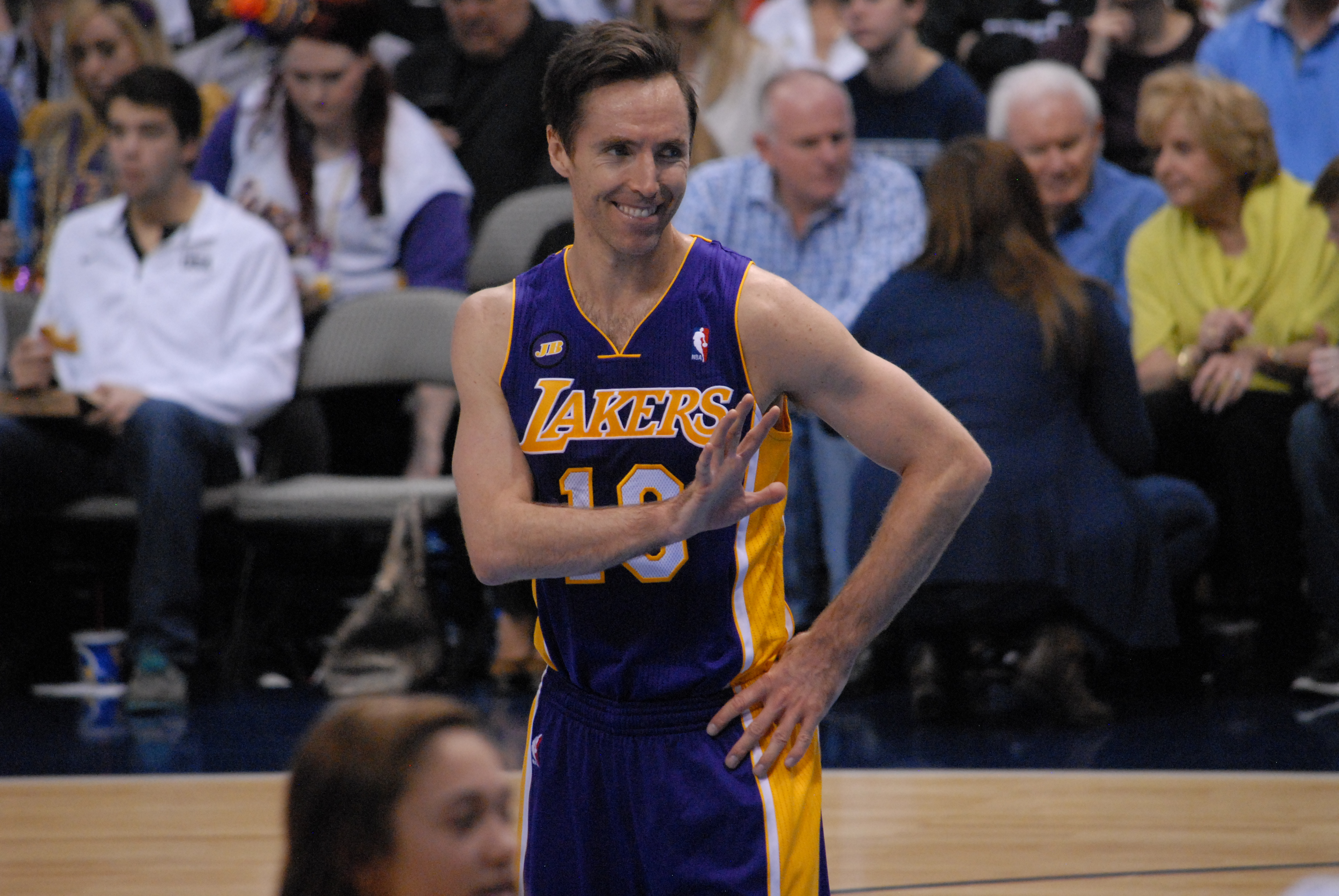 basketball,nba,2/24/2013 steve nash